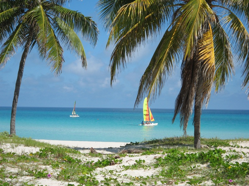 Playa de varadero, Cuba